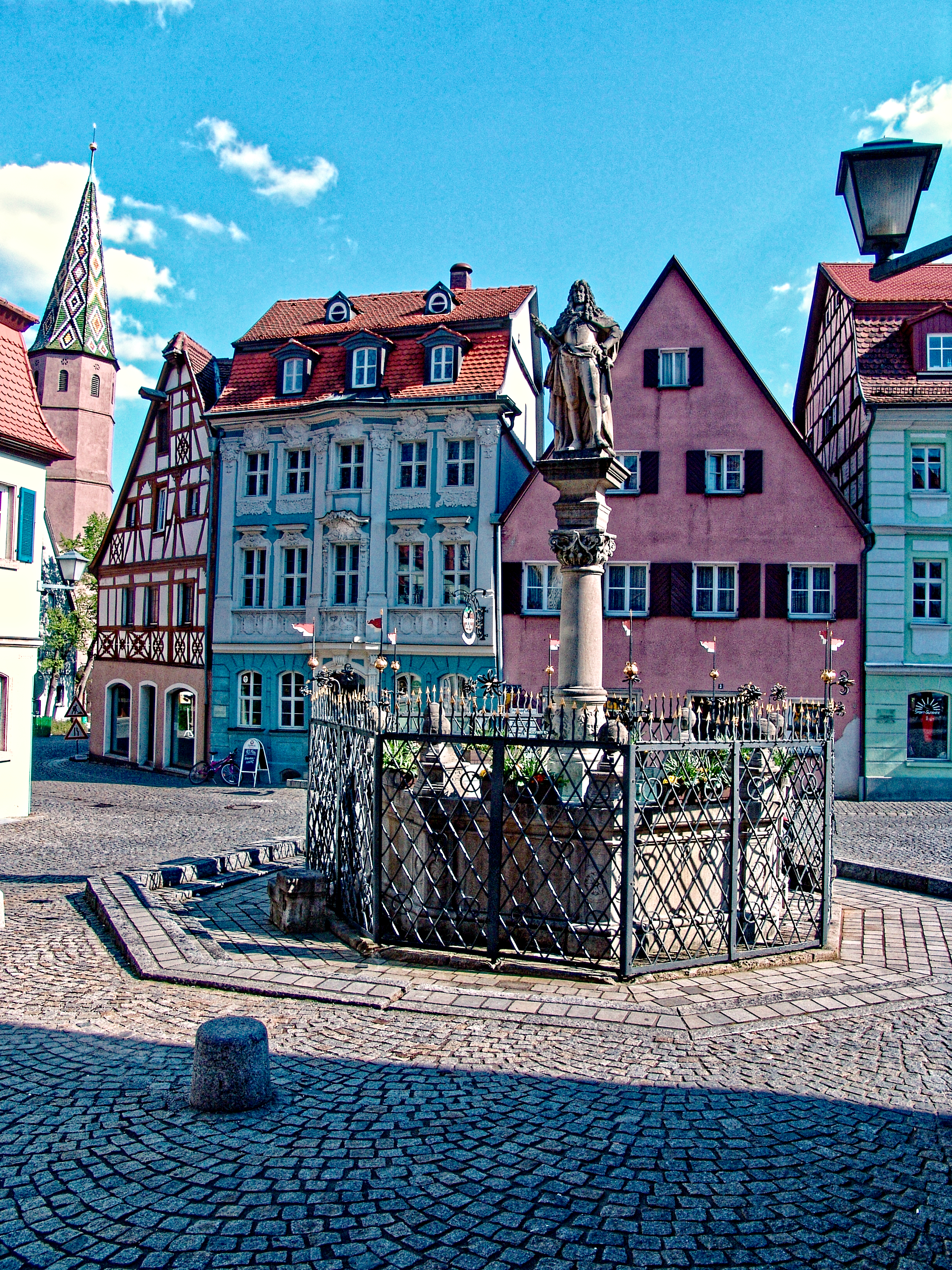 Bad Windsheim - schöner Brunnen ursprünglich von 1572; der gesamte Brunnen mit Becken von 1590, die mit 1626 datierte Bildsäule und die Statue Kaiser Karls VI. von 1727, das Gitter stammt von 1590